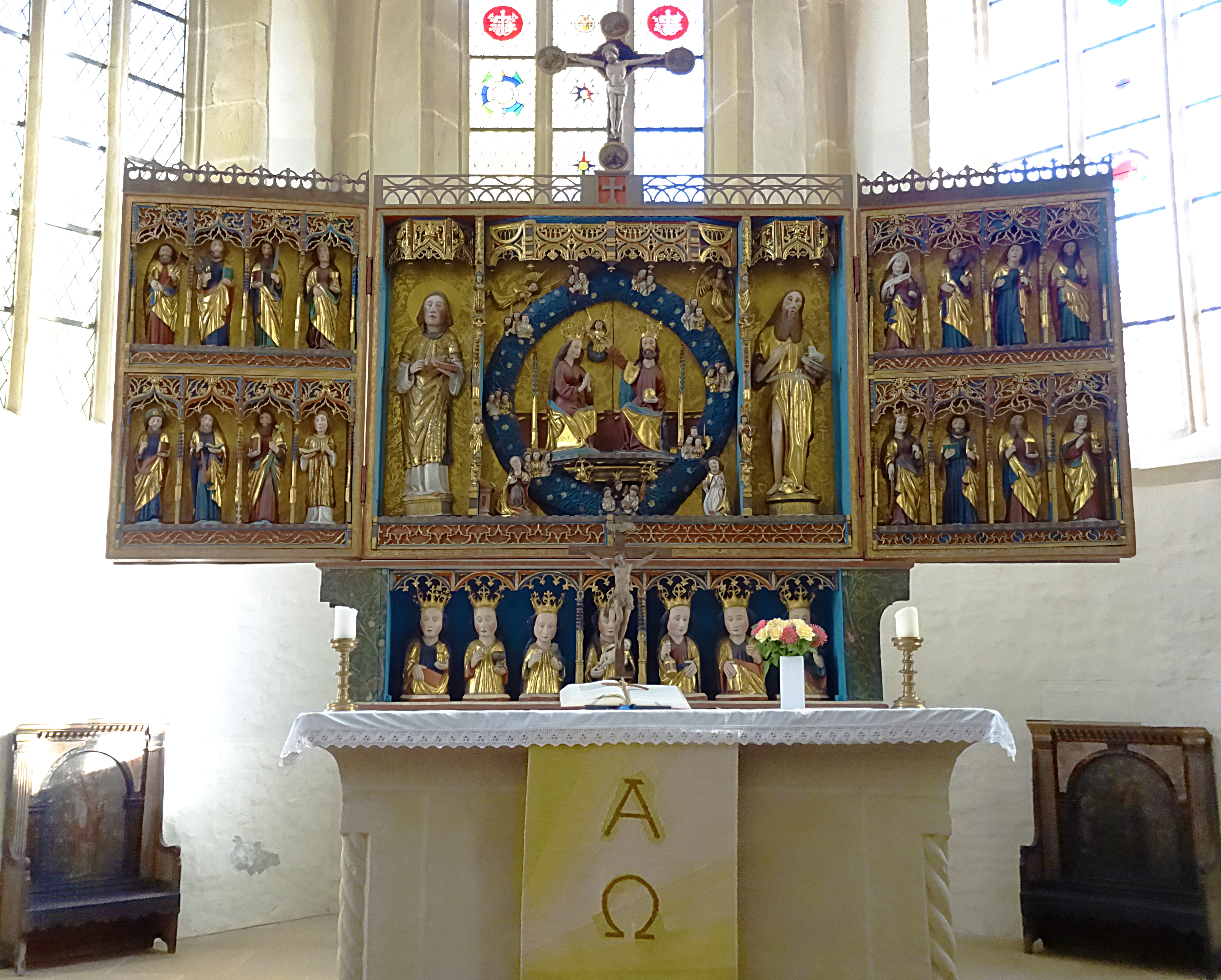 Spätgotischer zweifacher Wandelaltar (1484) in St. Stephani (Osterwieck)